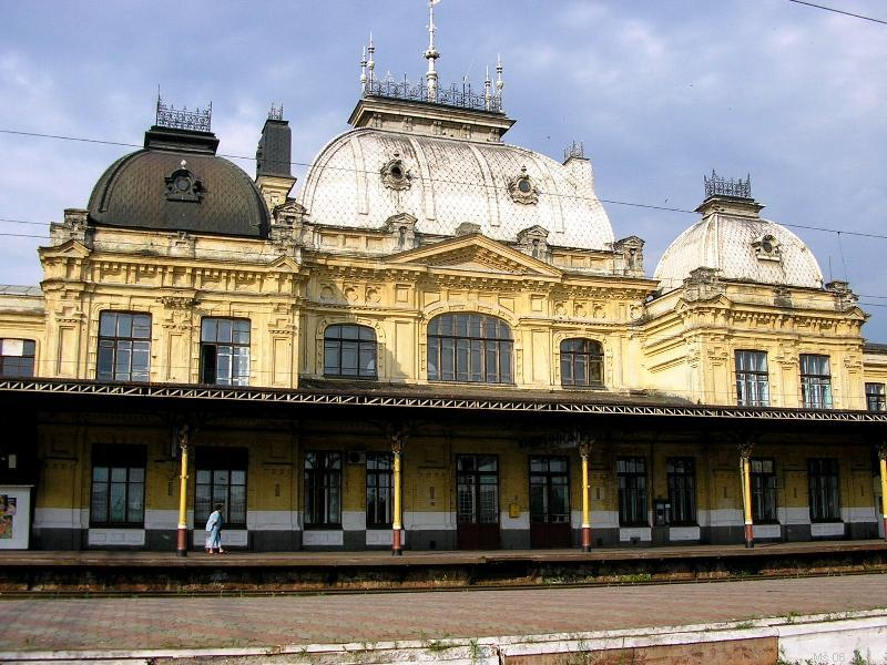 Nádraží ve Žmerynce.